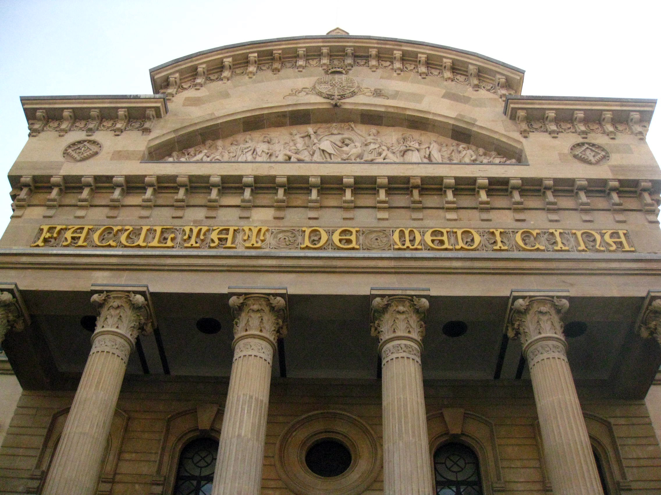 Facultat de Medicina (Barcelona)